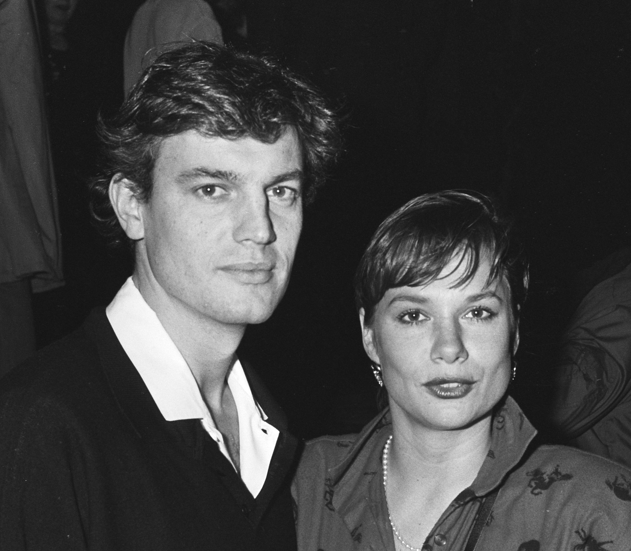 Perspremière van de film "De aanslag" naar een roman van Harry Mulisch. Hoofdrolspelers Derek de Lint (links) en Monique van de Ven